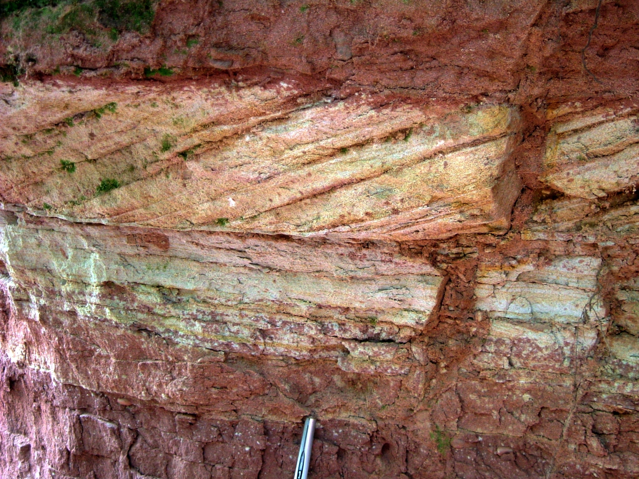 Kreuzschichtung im Buntsandstein (nahe Teufelstisch / Pfalz)